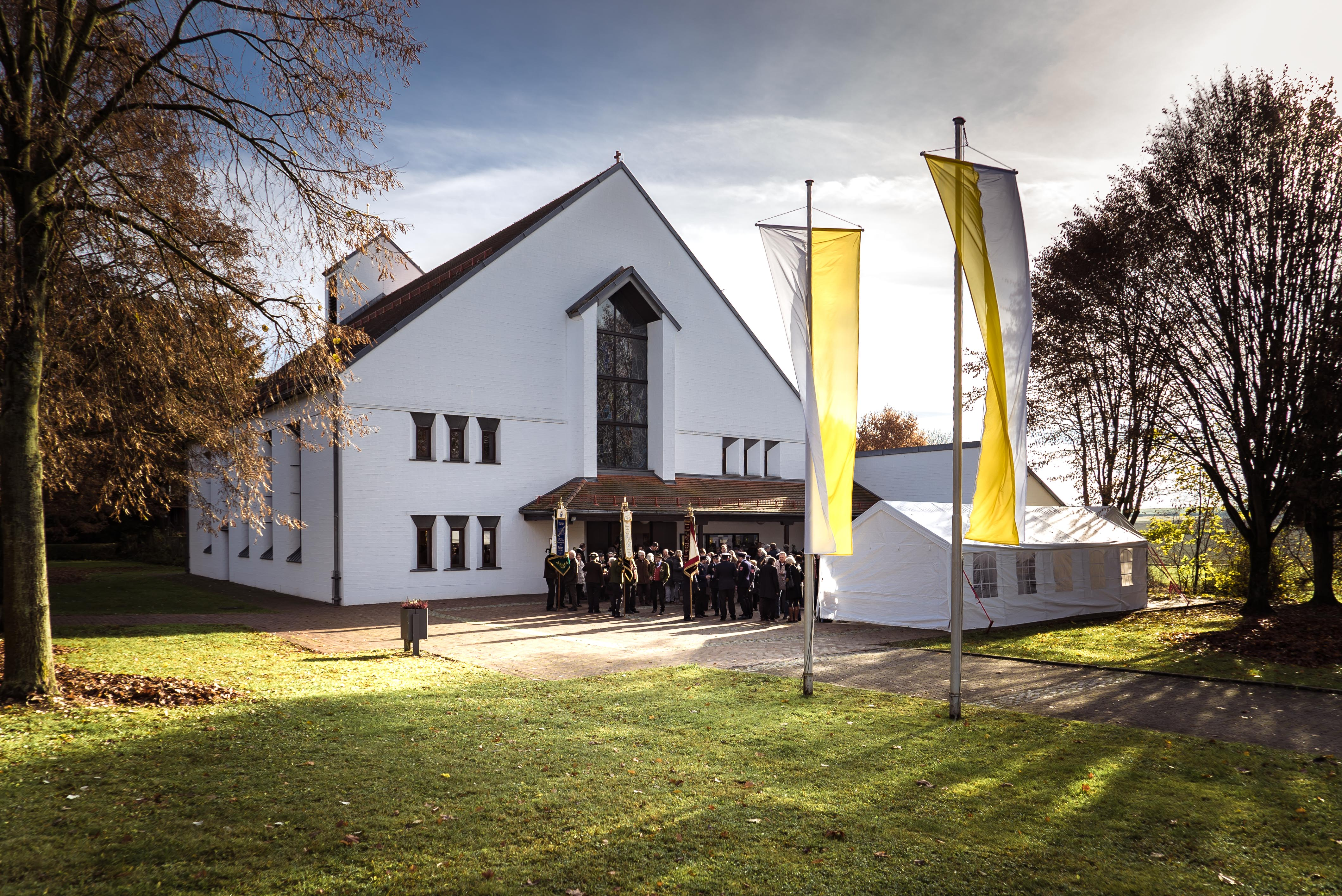 Dieses Bild zeigt die Kirche St. Benedikt in Regensburg, Oberisling, am 20.11.2016, dem Tag der Orgelweihe.